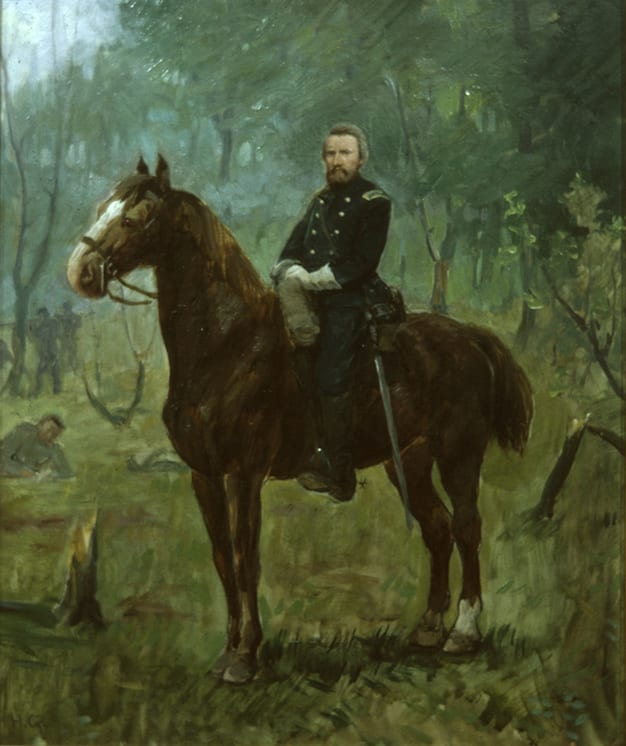 Maleri av Herbjørn Gausta (1854-1924) fra 1915, som viser den norsk-amerikanske borgerkrigsoffiseren Hans Christian Heg